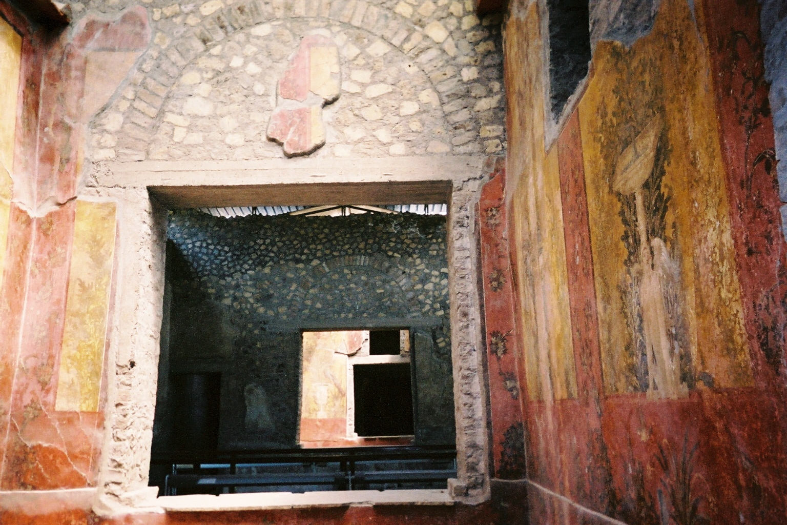 Détail d'une fresque de la villa de Poppée à Oplontis (Italie)